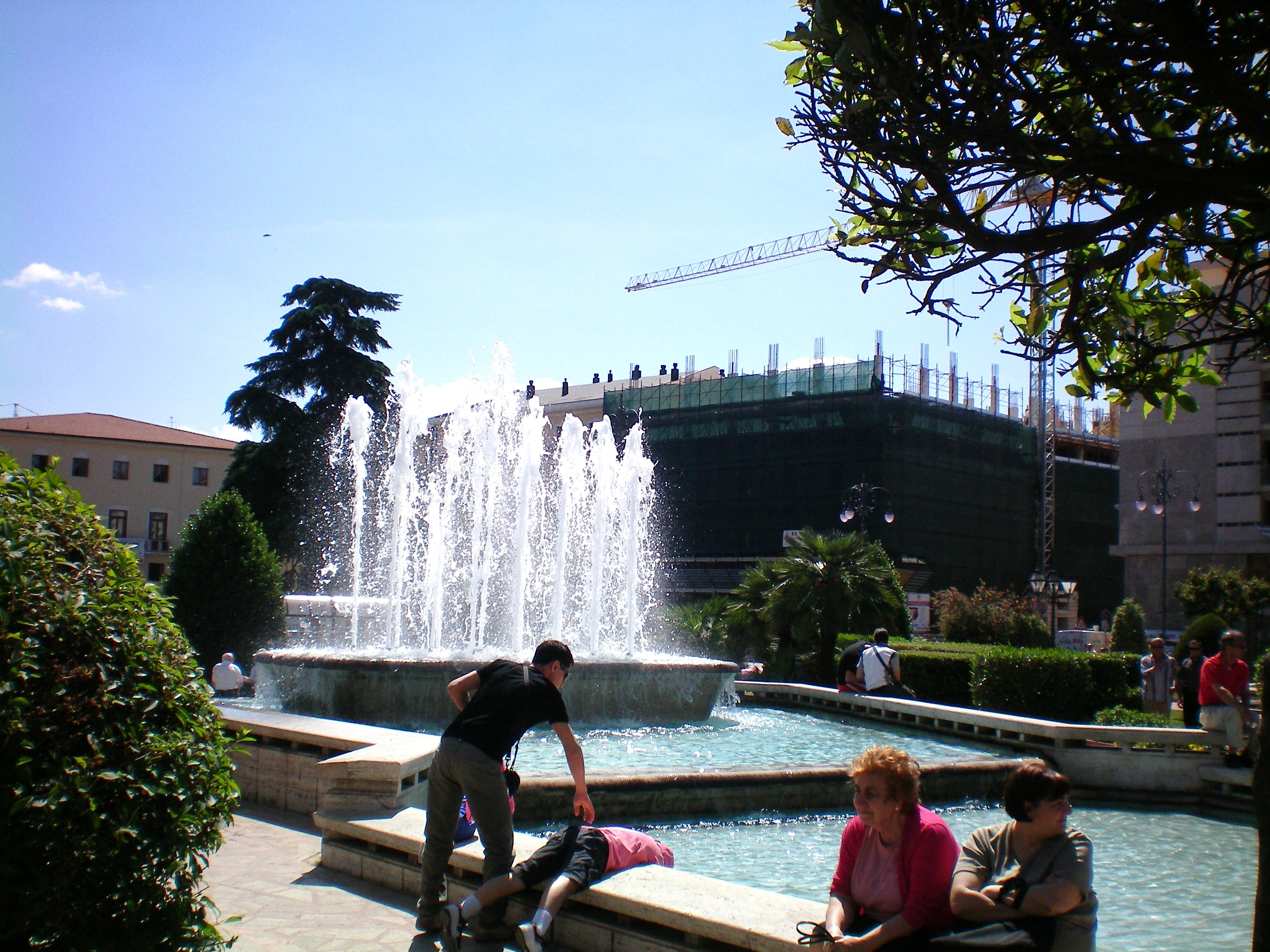 Fontane di Piazza Libertà